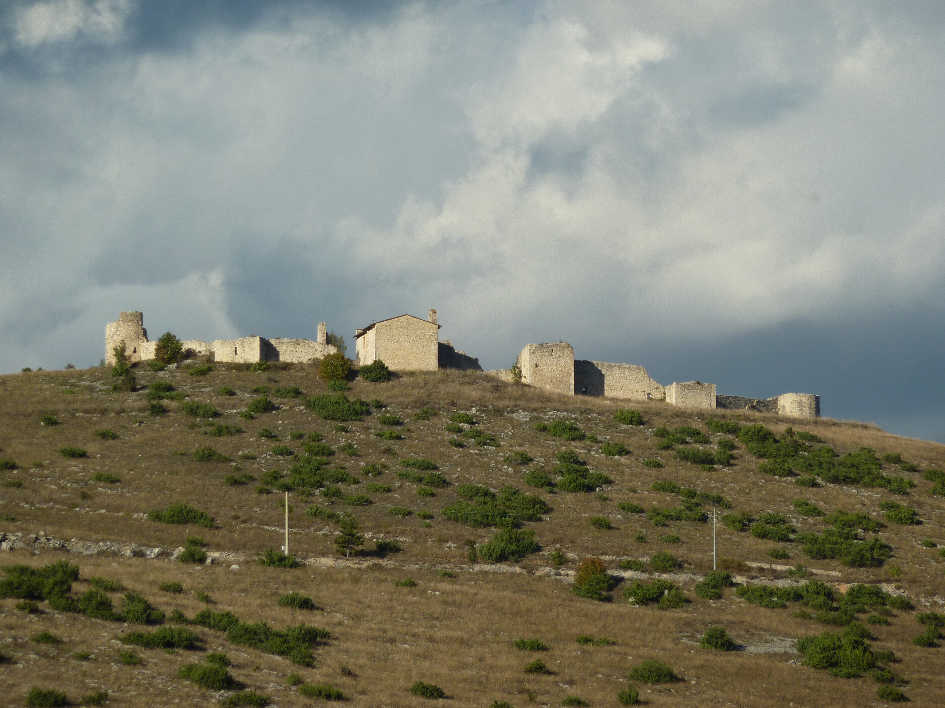 Sant'Eusanio Forconese (AQ): castello